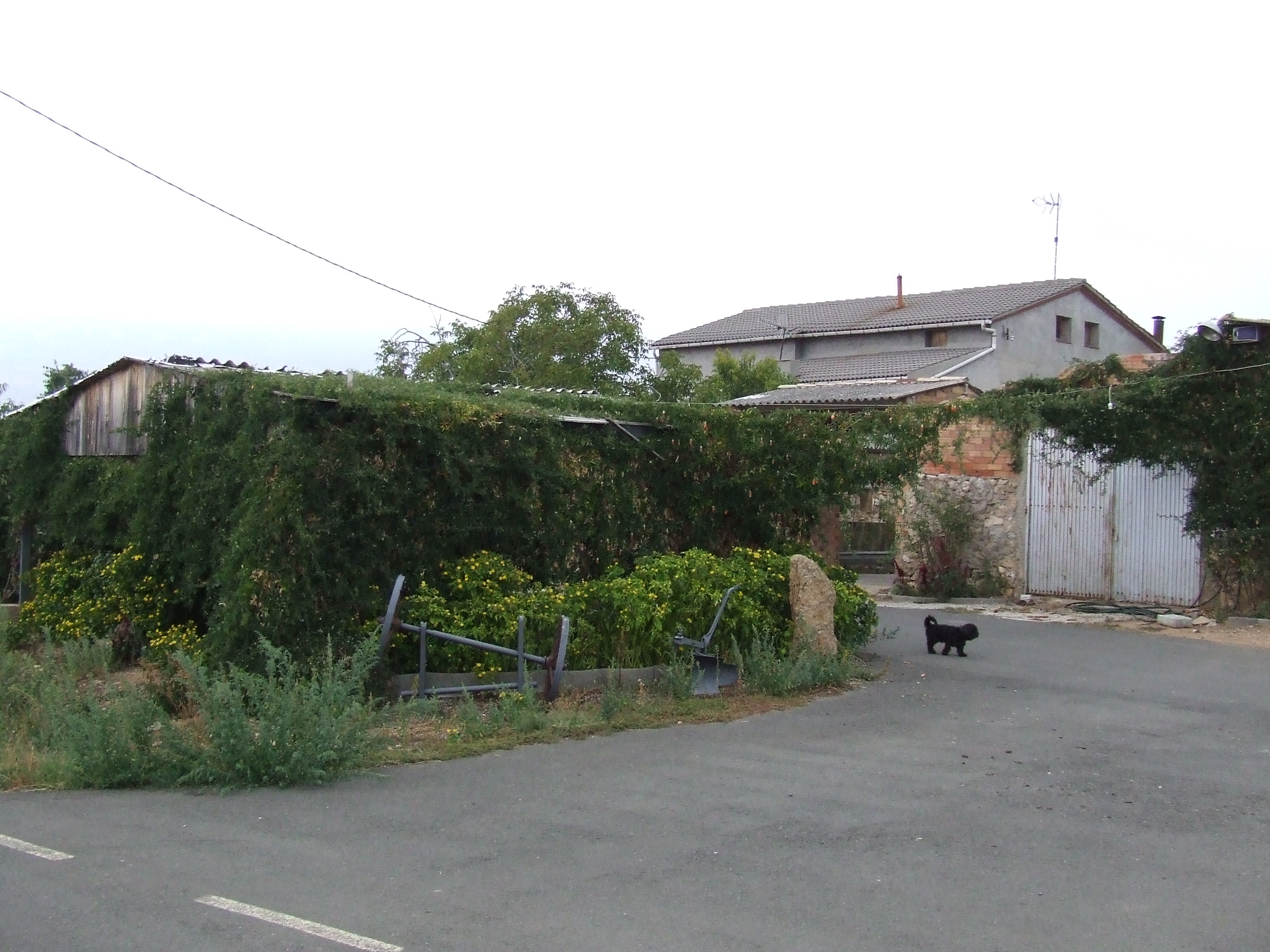 Cal Pere de la isidra (Abella de la Conca, Pallars Jussà)